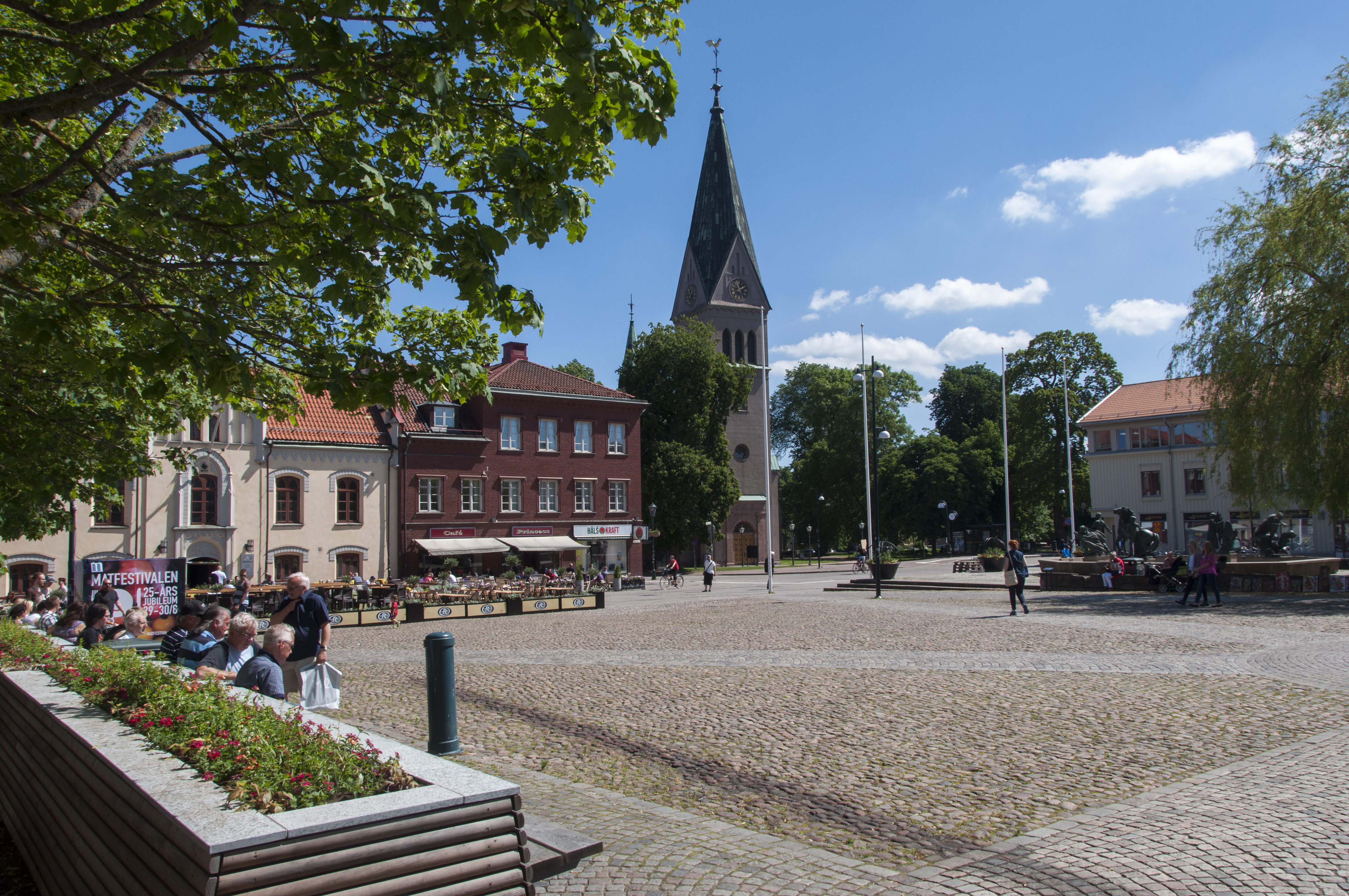 Hertig Johans torg, Skövde